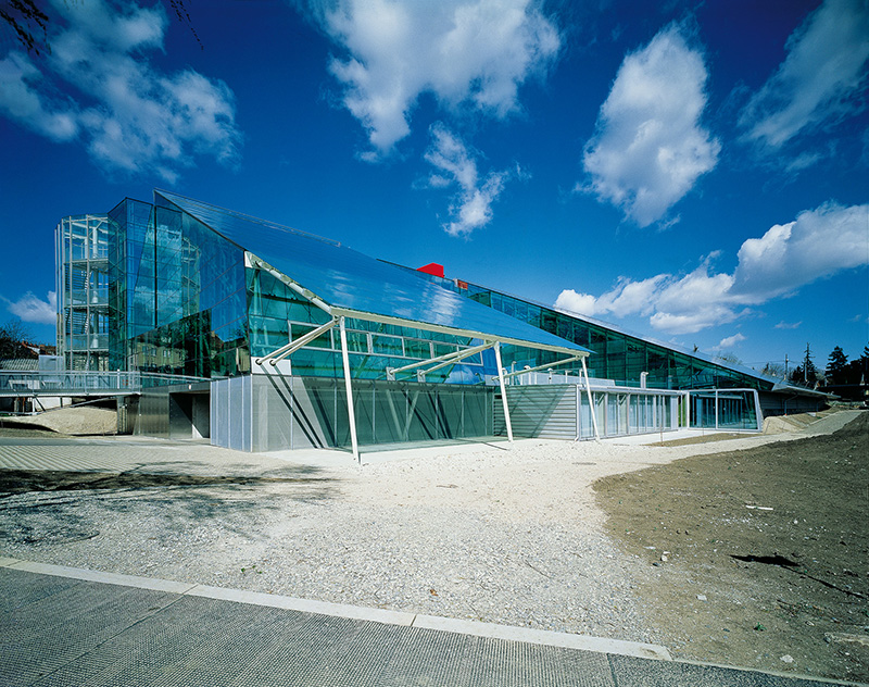 Informatik-Mittelschule Kinkplatz von Helmut Richter